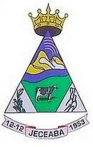 Brasão de armas do município de Jeceaba, Minas Gerais, Brasil.